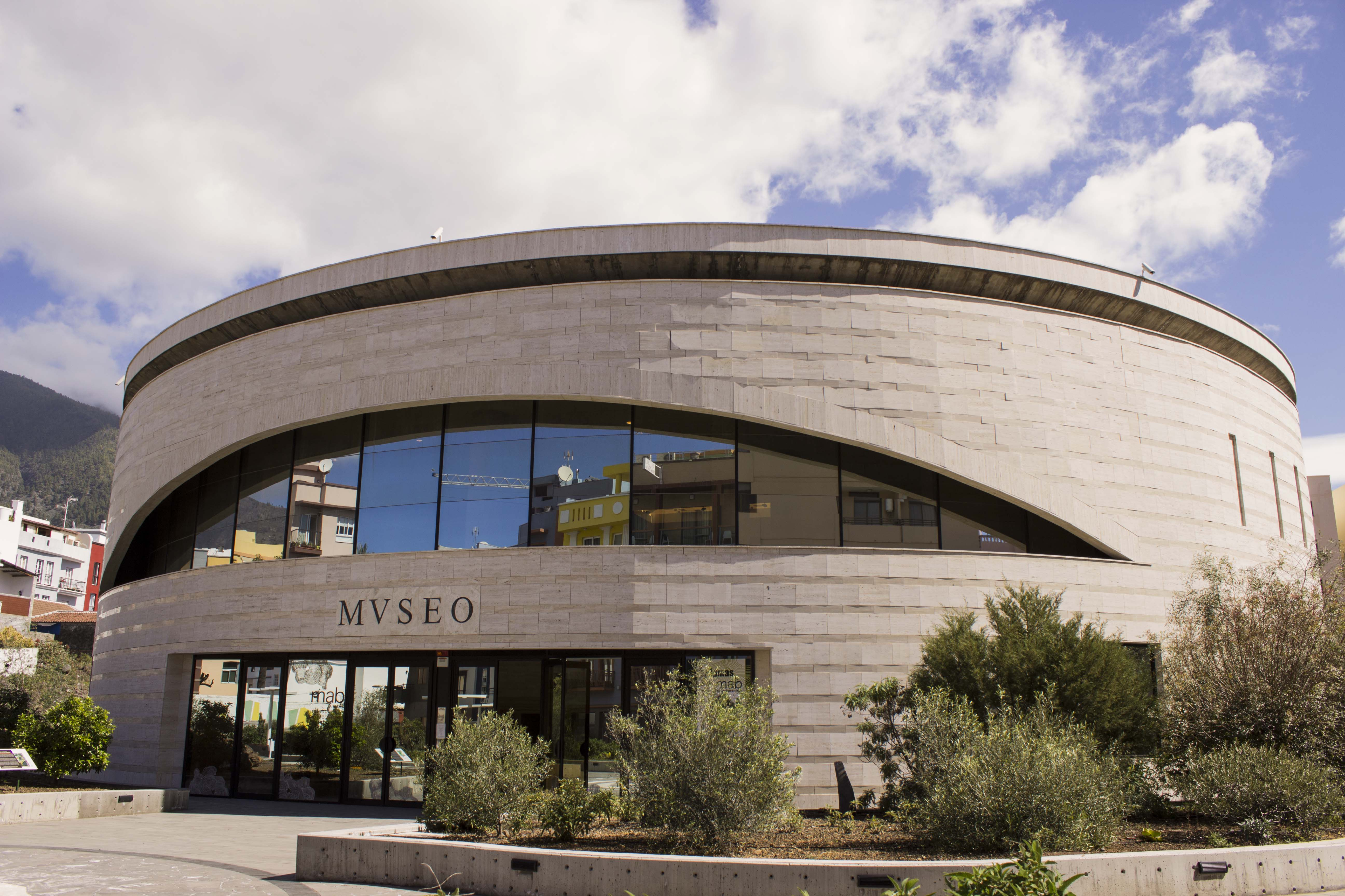 Pretende ser una referencia cultural imprescindible para la isla de La Palma, mostrando a los palmeros y visitantes el hábitat. industrias, aprovechamiento del medio y creencias mágico-religiosas de los benahoaritas, utilizando para ello los más modernos medios audiovisuales y museográficos disponibles en la actualidad.